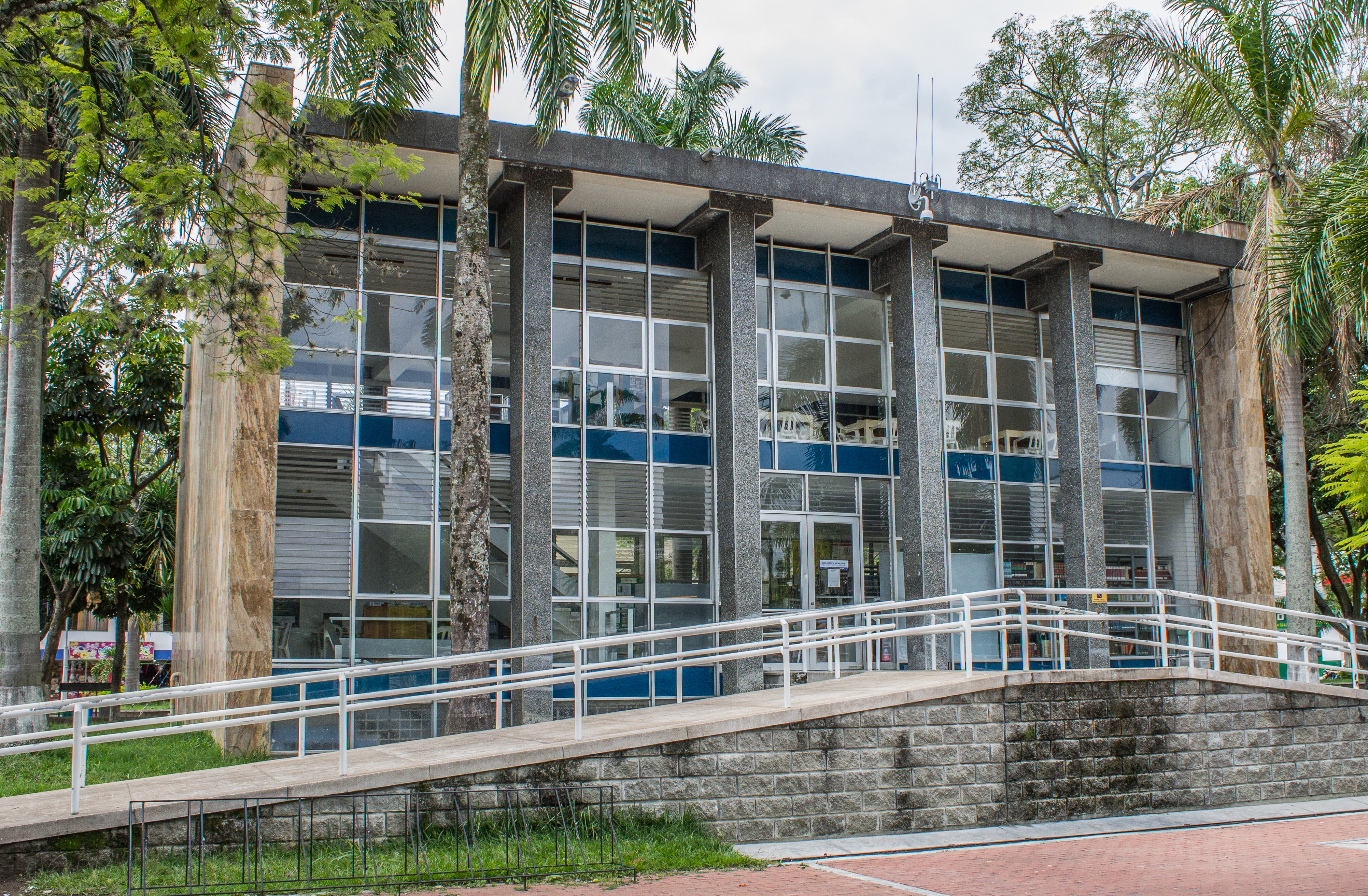 Biblioteca Municipal de Tuluá.